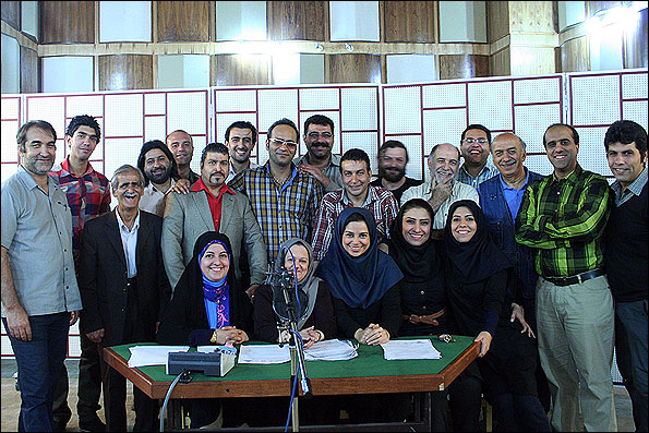 فرهاد ظريف به عنوان مهمان برنامه کوی نشاط به همراه عوامل برنامه در ویژه برنامه روز پدر